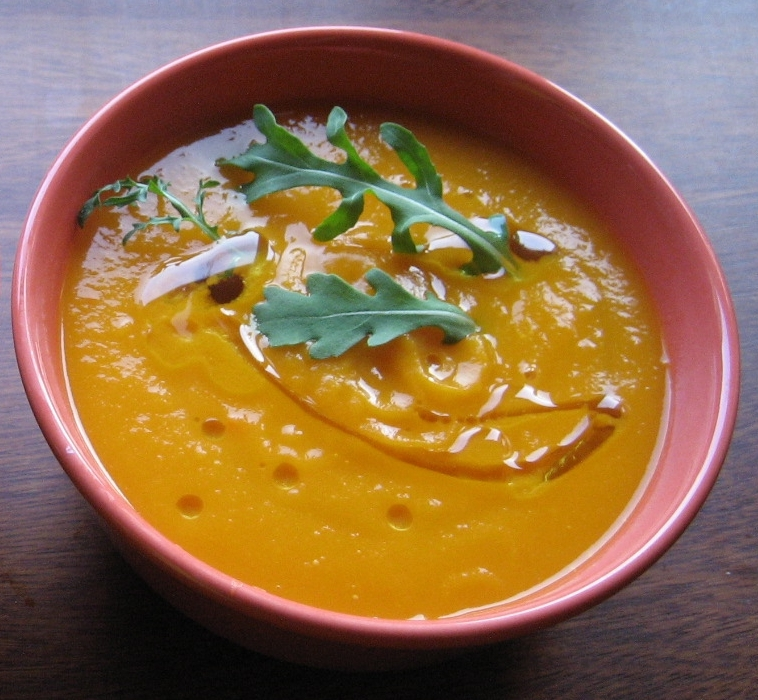 Crema de calabaza aunque también contiene un poco de pimiento verde (italiano), rojo (morrón) y una cebolla pequeña. Sal y un poco de aceite. Añadido a la hora de servir hojas de rucola, a uno de ellos salsa de soja y al otro aceite de oliva virgen extra.